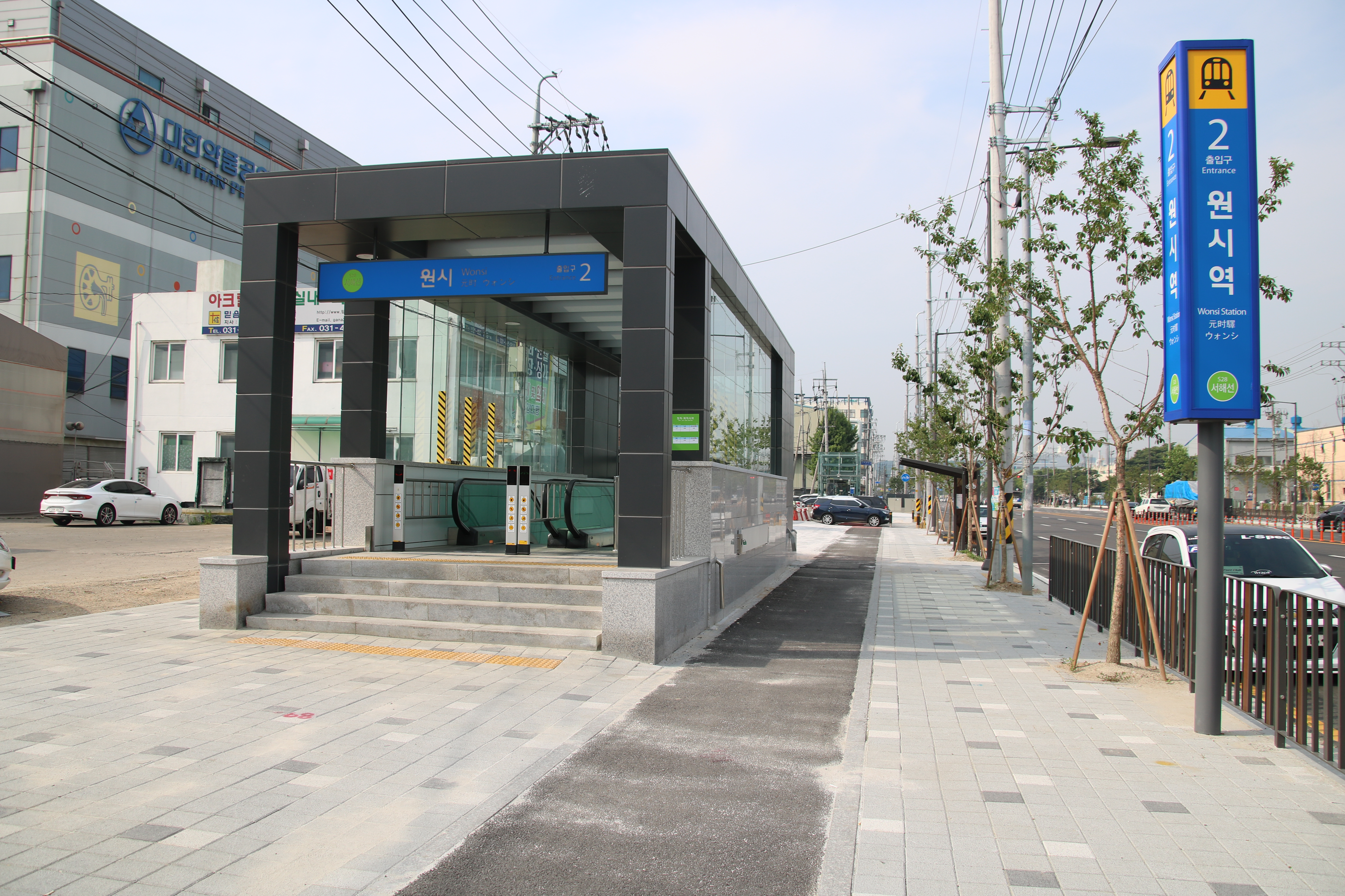 원시역 2번 출입구